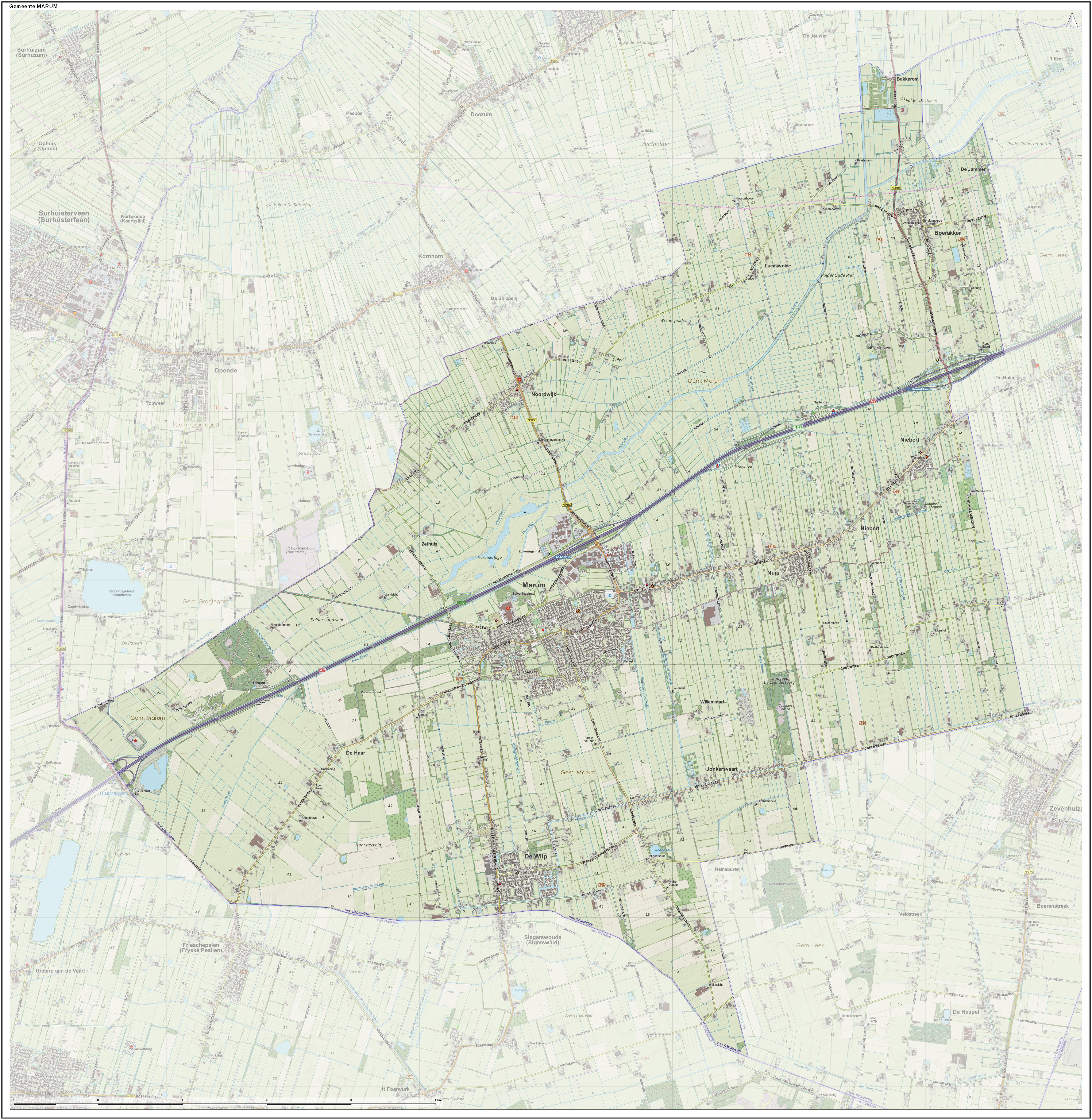 Topografische gemeentekaart. Resolutie: 400 pixels/km. Kaartbeeld samengesteld uit de open geodata van de Top10NL en Top25namen (Kadaster), Creative Commons-BY licentie. Gebouwvlakken uit open geodata BAG extract. Wegen uit de OpenStreetMap, OpenStreetMap community. Reliëfschaduw uit de Actuele Hoogtekaart AHN2. Samenstelling en kleurenschema: Jan-Willem van Aalst, met QGIS. Zie ook de Legenda.